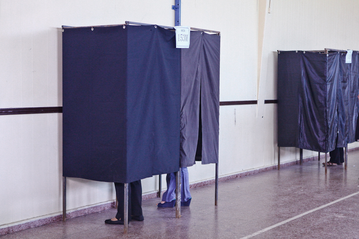 Michelle votó en colegio Teresiano Enrique de Ossó 17/11/2013